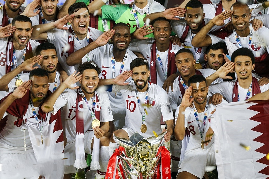 دیدار فینال جام ملت‌های 2019 آسیا بین تیم ملی فوتبال قطر و ژاپن بعدظهر جمعه 12 بهمن در ورزشگاه زاید به قضاوت روشن ایرماتوف ازبکستانی برگزار شد.المعزعلی در دقیقه 12 و عبدالعزیر حاتم 27 و اکرم عفیف در دقیقه 83 با ضربه پنالتی برای قطر گلزنی کردند.برای ژاپن مینامینو 69 موفق به گشودن دروازه قطر شدند.